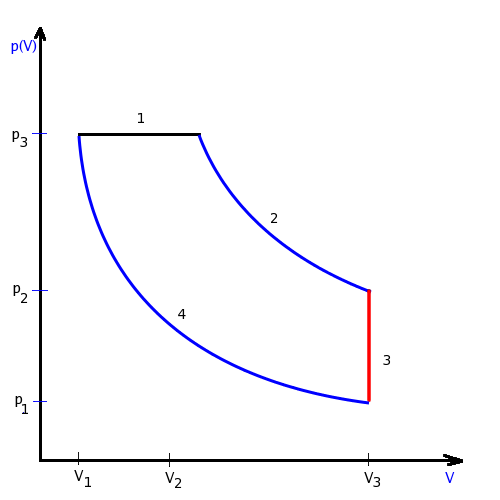 Predstawia cykl Diesla w przestrzeni p-V